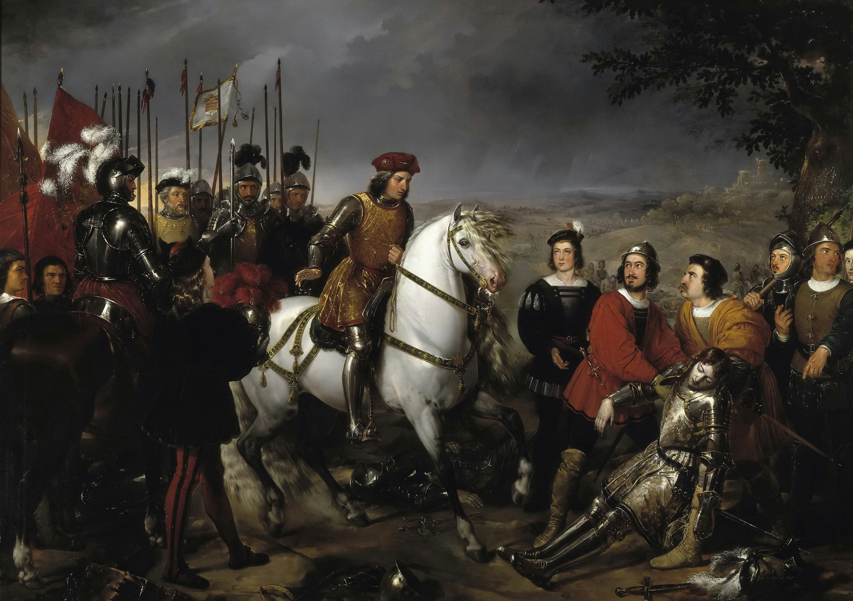 El lienzo muestra a Gonzalo Fernández de Córdoba (1453-1515), conocido como "el Gran Capitan", contemplando el cadáver del Duque de Nemours, comandante del ejército francés en la batalla de Ceriñola, en la que el ejército francés resultó derrotado y el Duque de Nemours perdió la vida.